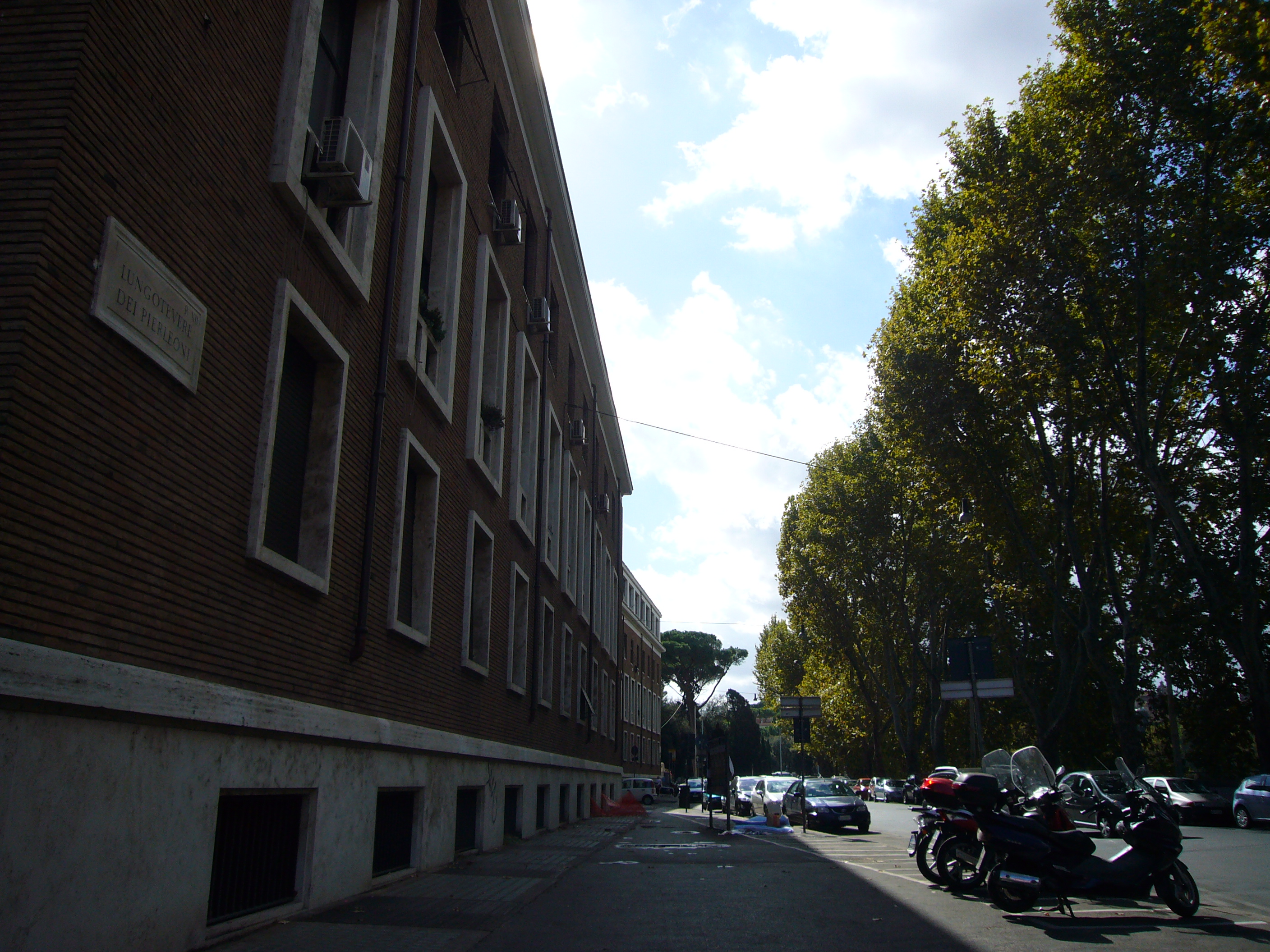 Lungotevere dei Pierleoni et palais dell'Anagrafe (Rome, Latium, Italie).